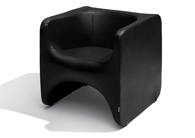 NU CHAIR